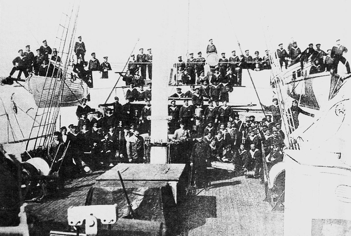 Группа офицеров и команды парохода "Великий князь Константин". Слева - паровой катер "Сухум" (бывший "Минер"), поднятый на боканцы "Константина", (см. его увеличенное изображение на др. фото)